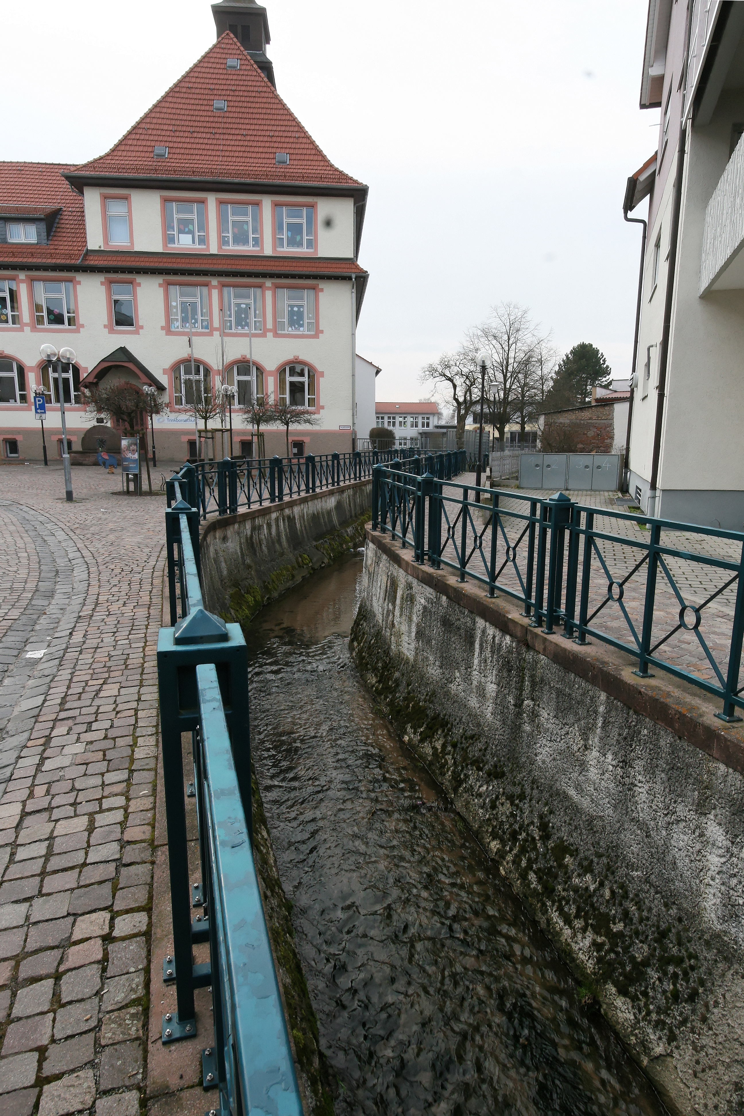 Kanalisierter Bachlauf der Rodau an der Trinkbornstraße in Ober-Roden, einem Stadtteil von Rödermark.